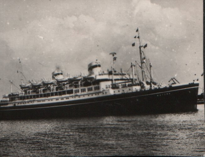 Zdjęcie statku MS Batory sprzed II wojny światowej.